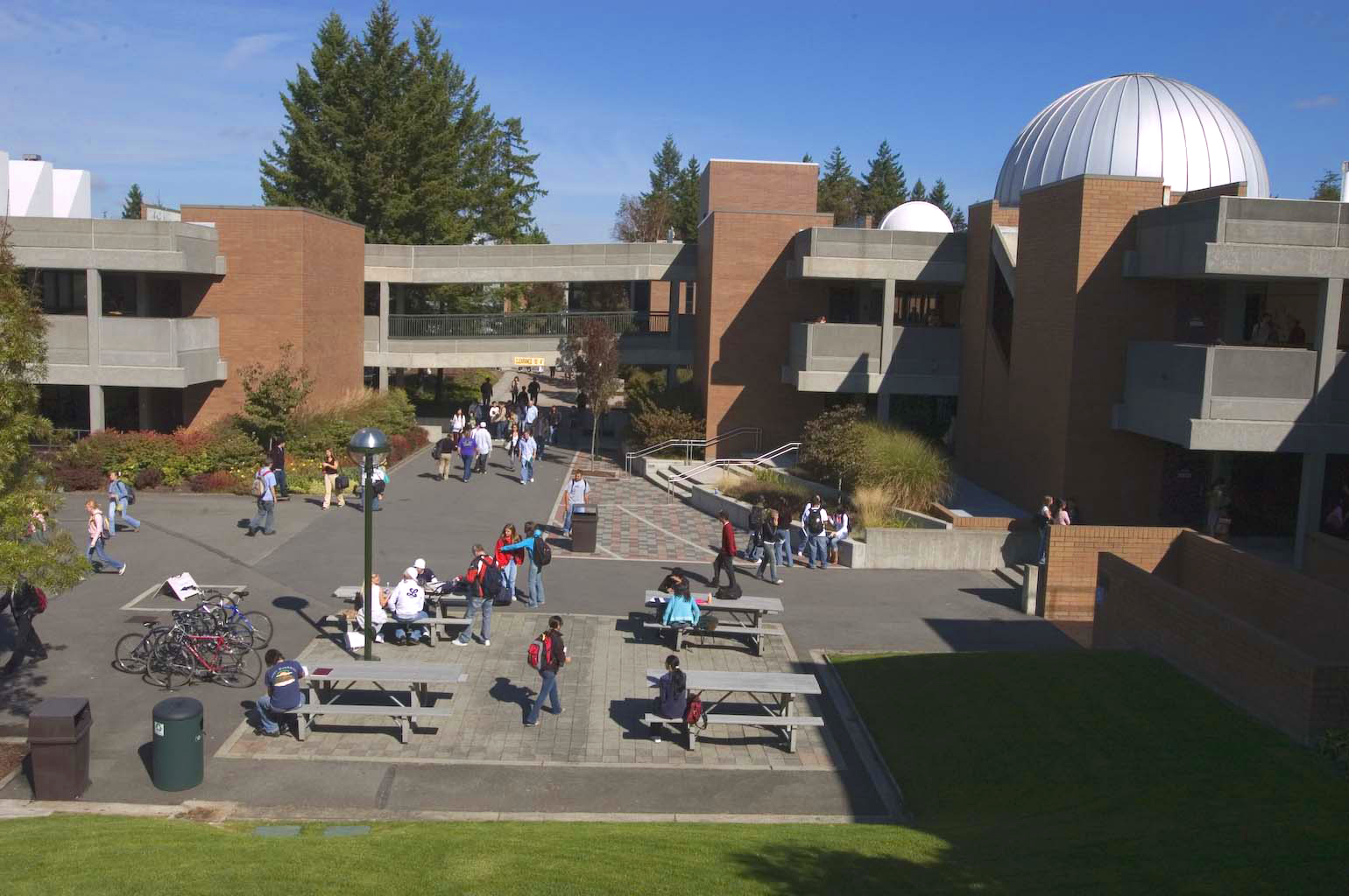 Bellevue College campus